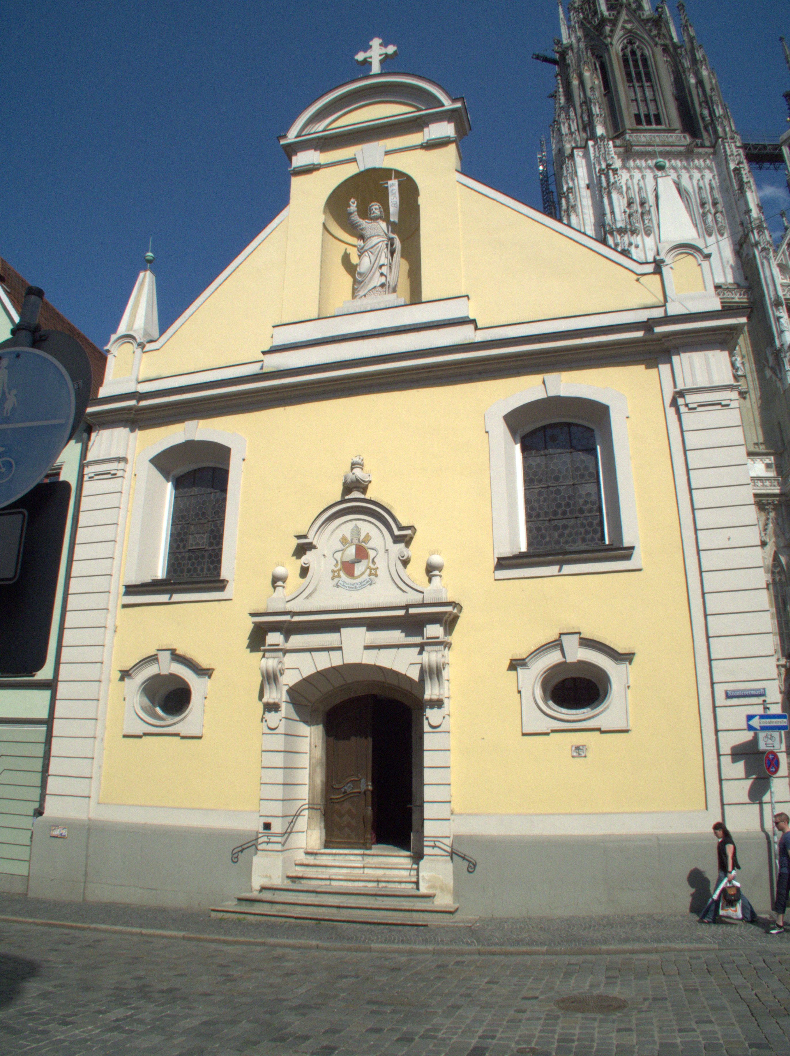 Stiftskirche St Johann in Regensburg am Krauterermarkt 5: Westseite